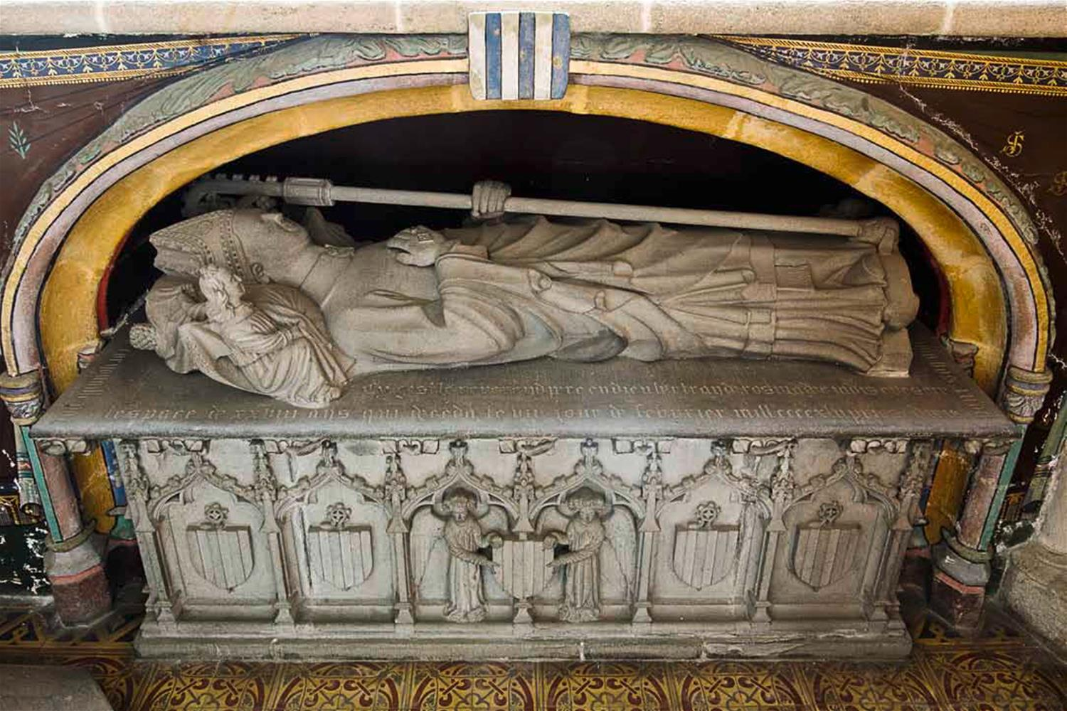 Mgr Bertrand de Rosmadec fut évêque de Quimper de 1416 à 1444